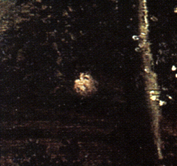 detail